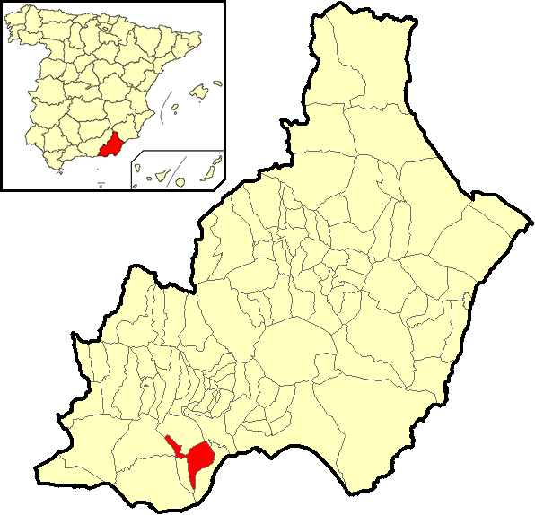 Situación del término municipal de Vícar respecto a la provincia de Almería, en España.